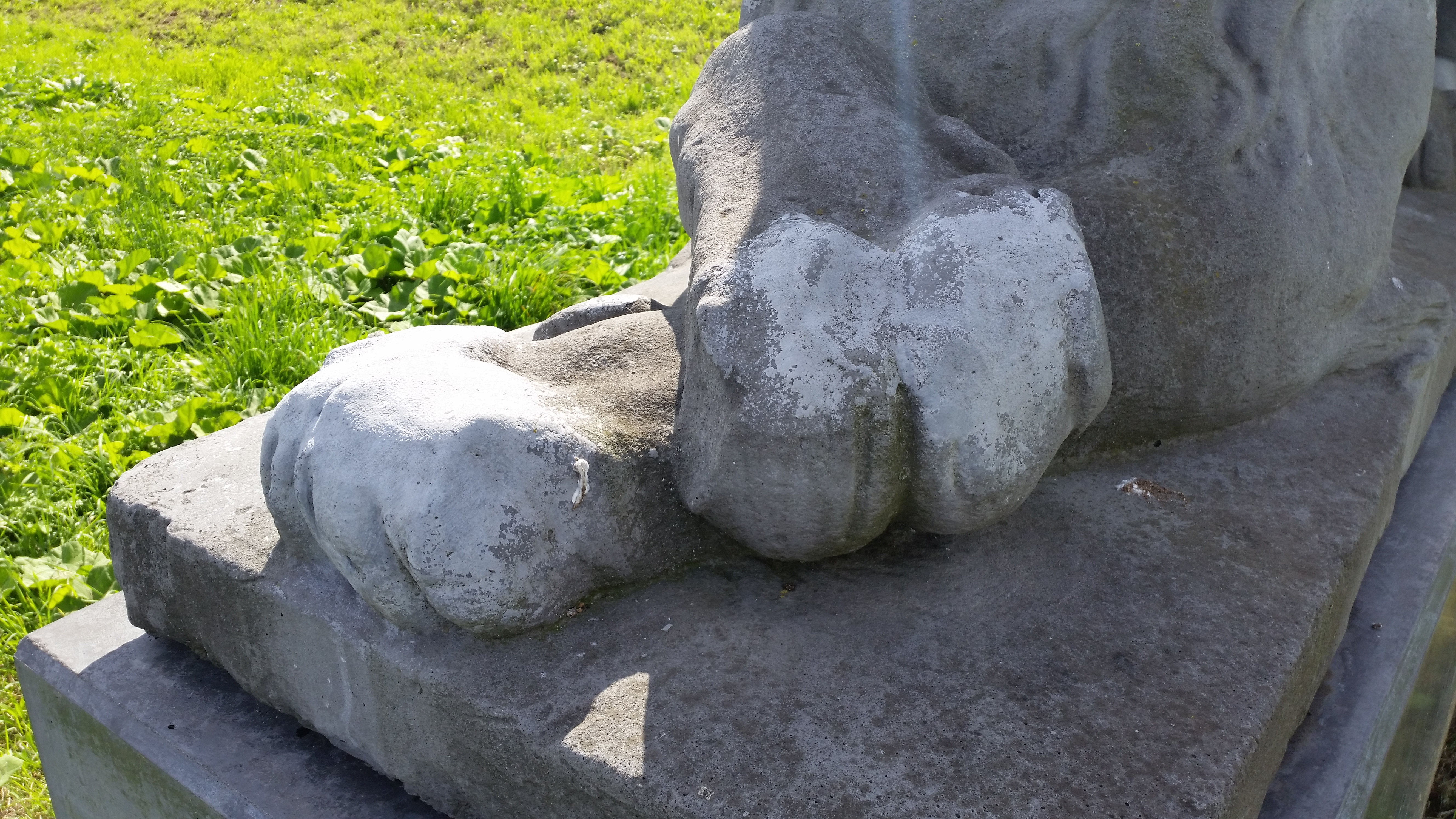 Rechter voorpoot over linker Leeuwen (Bart van Hove, Amsterdam)